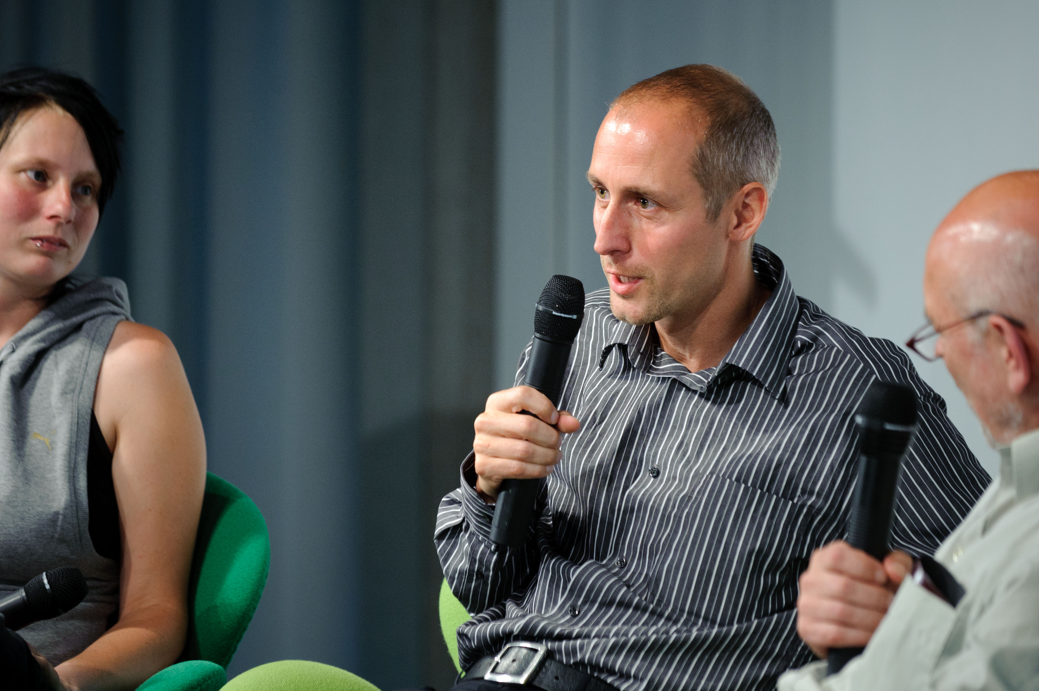 Marcus Urban (SC Sternschanze Hamburg, Autor "Versteckspieler") Foto: Stephan Röhl